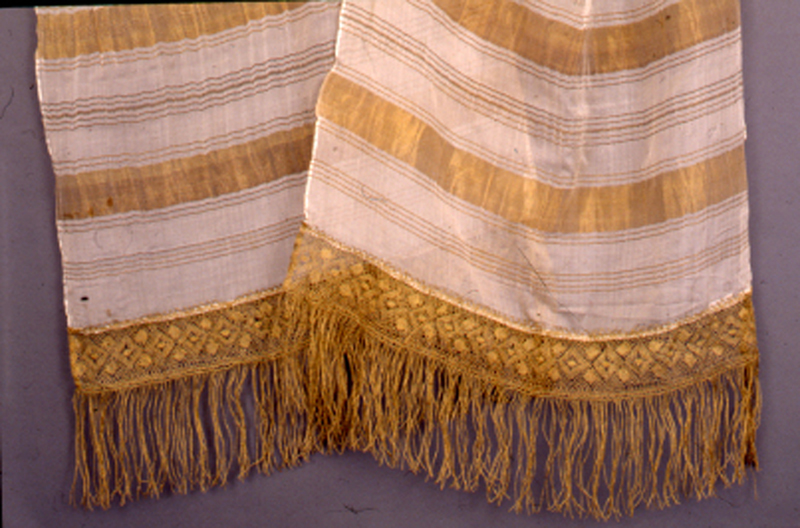 Μπόλια της ενδυμασίας κυρίας επί των τιμών, που καθιέρωσε η βασίλισσα Όλγα Αθήνα. Μέσα 19ου αιώνα 1985.6.59 / Συλλογή Πελοποννησιακού Λαογραφικού Ιδρύματος